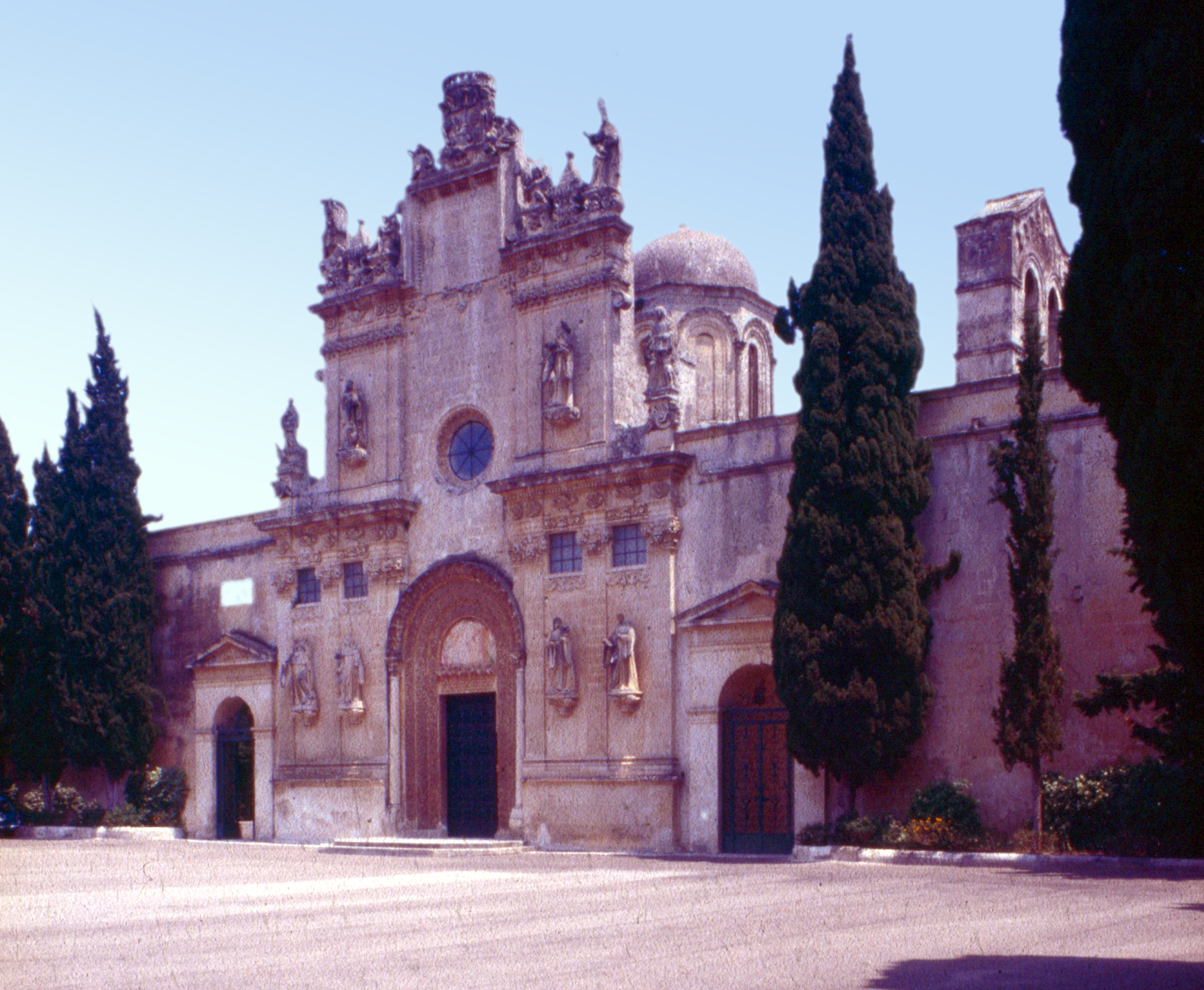 Santi Niccolò e Cataldo (Lecce)